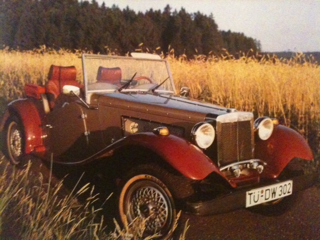 Der Sunroad Classic des Automobilherstellers Walz & Kessler